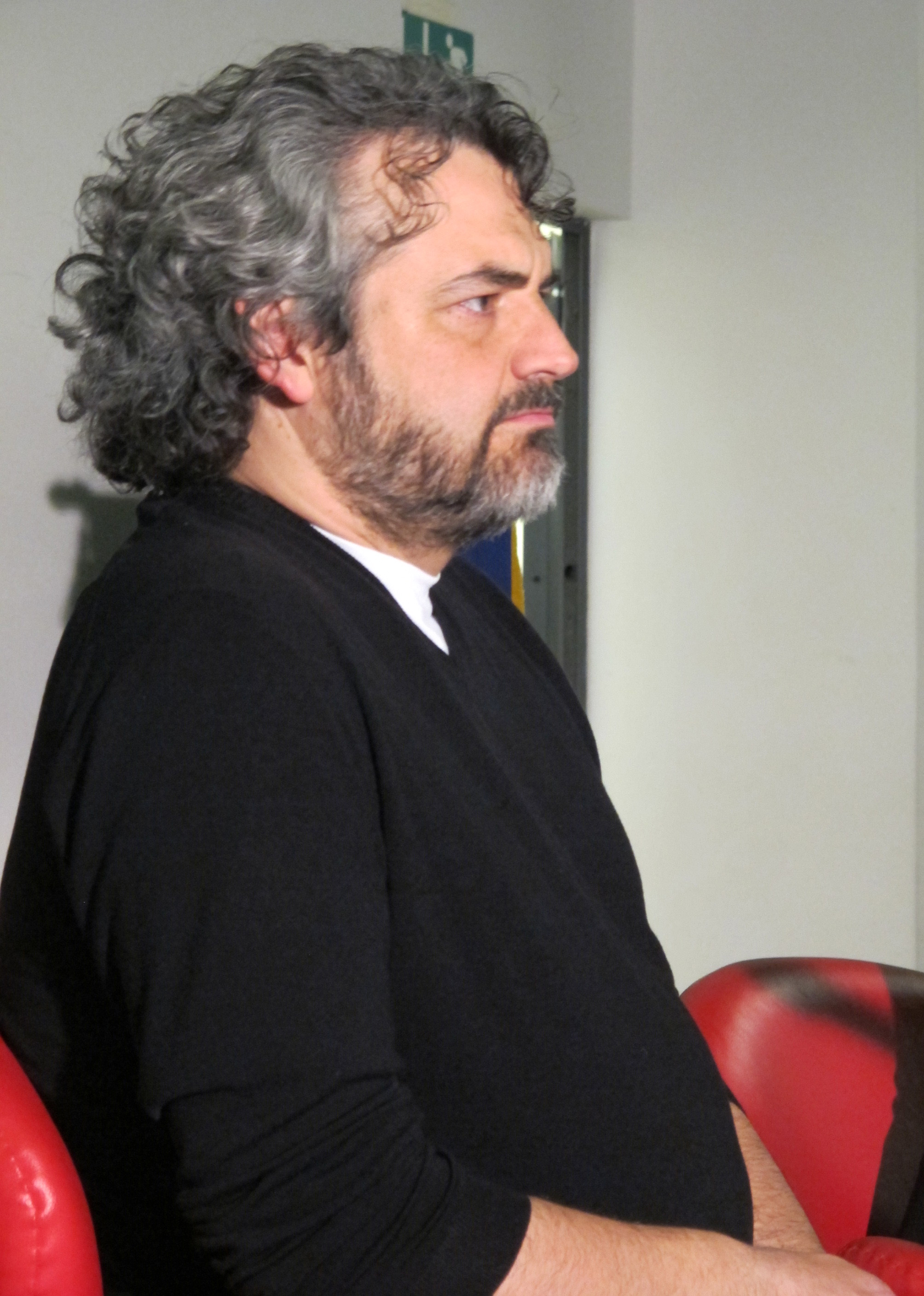 Edoardo nesi, biblioteca lazzeriniana di prato, marzo 2012